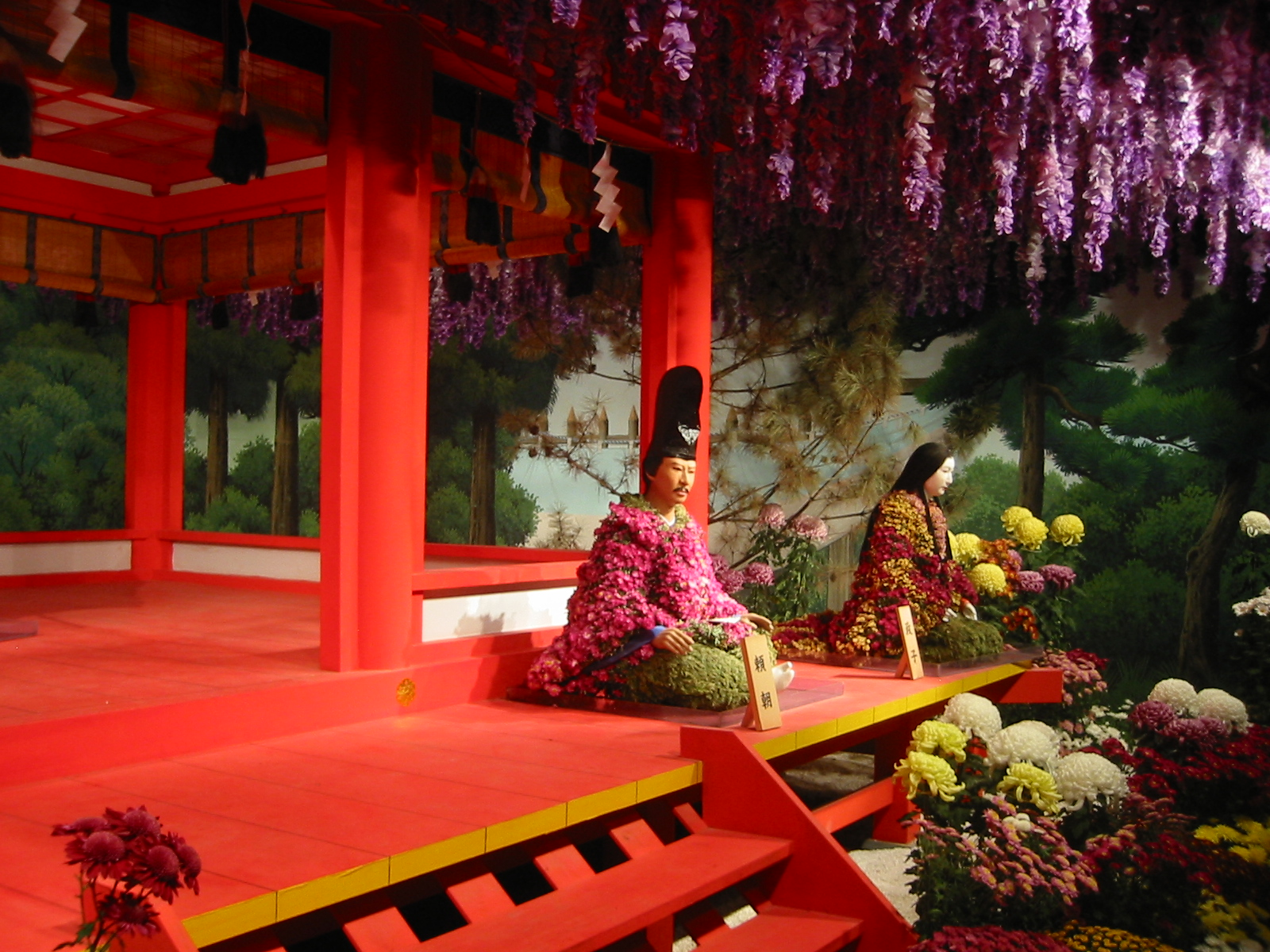 ひらかた大菊人形 義経 第九場面 静の舞